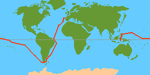 Journey of García Jofre de Loaísa 1525 - 1526